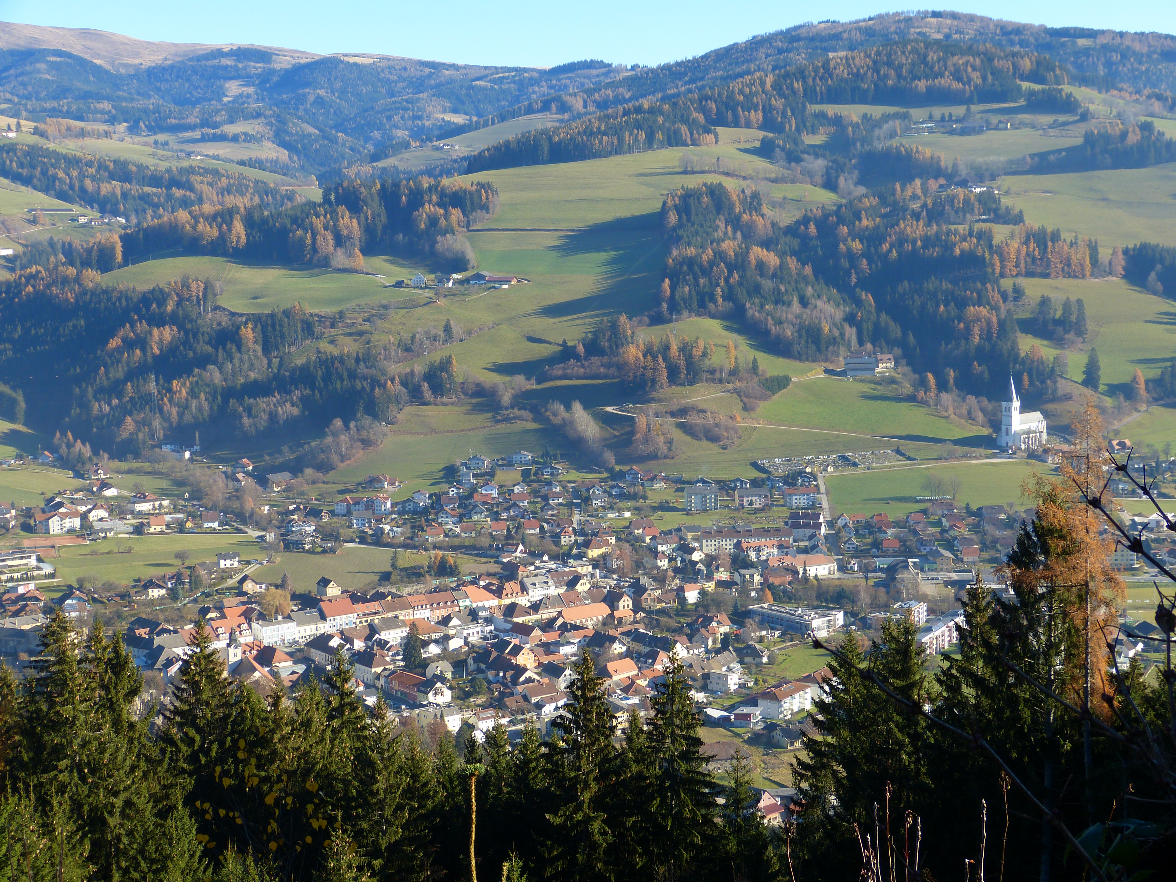 Blick hinunter ins Obere Lavanttal auf Bad Sankt Leonhard im Lavanttal: Altstadt, rechts davon die Pfarrkirche. Aufnahmeort Nähe Moselebauer, ca 930 m Höhe.